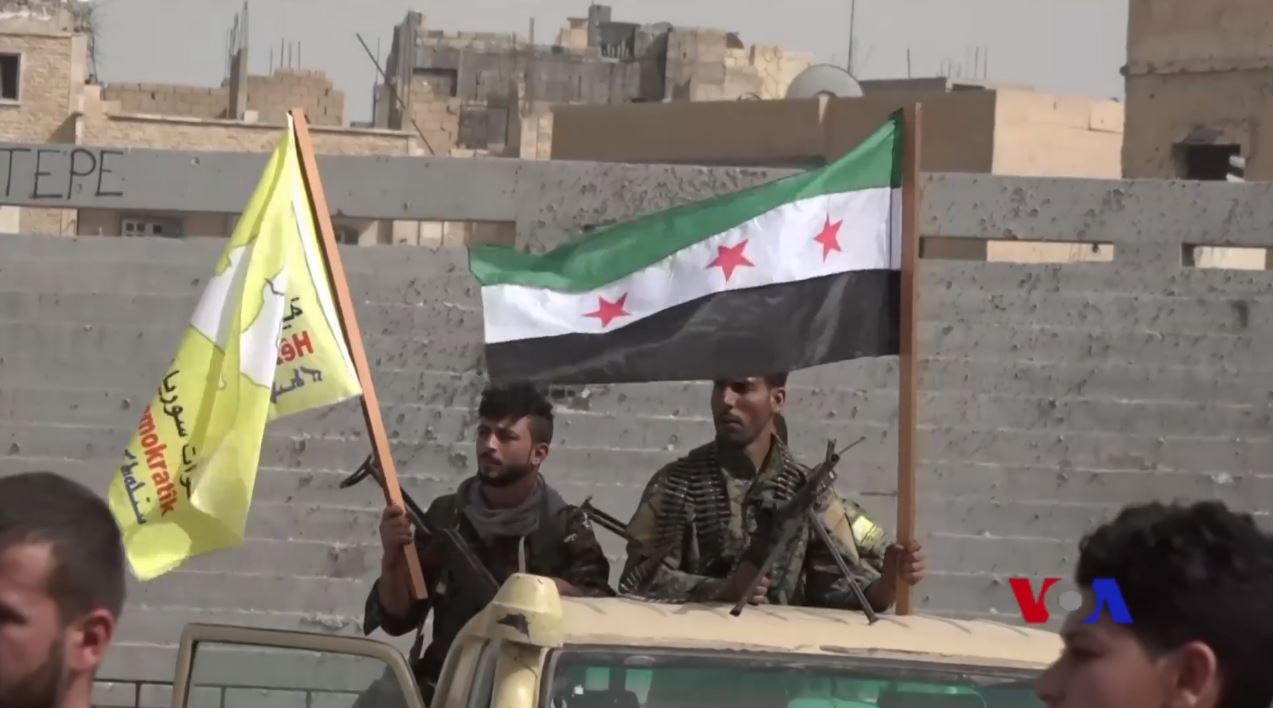 Combattants des groupes Jaych al-Thuwar et Liwa Chamal al-Democrati, affiliés aux Forces démocratiques syriennes (FDS), au stade de Raqqa, le 6 mars 2018. Abou Omar al-Idlebi, un commandant des FDS annonce alors le déploiement de 1700 combattants des FDS à Afrine contre la Turquie. 1 2 3